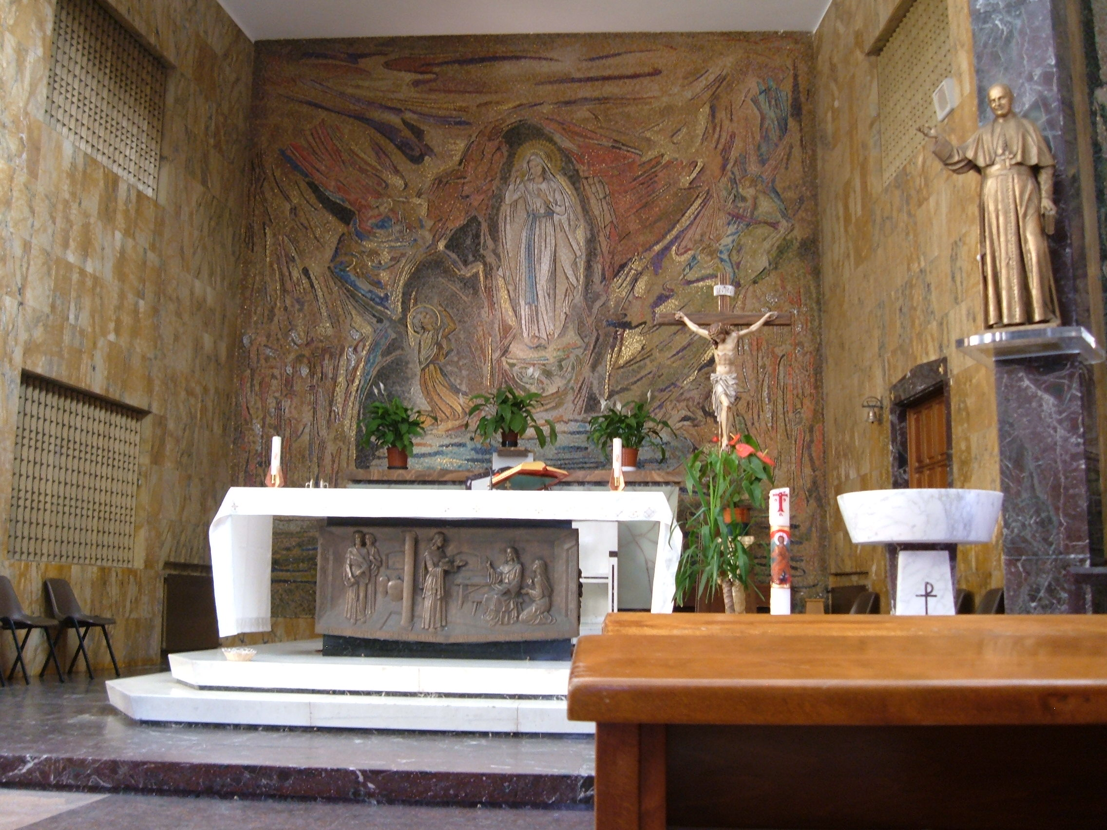 Chiesa di Santa Maria Immacolata di Lourdes, a Roma, nel quartiere Aurelio (via di Santa Bernadette). Interno: altare maggiore e mosaico delle Apparizioni di Lourdes.